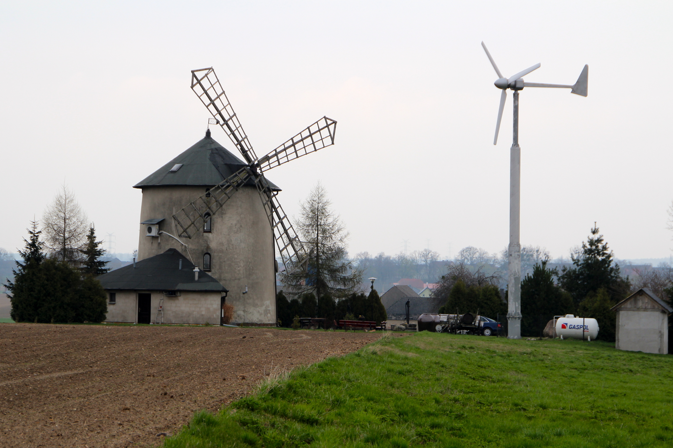 Łowkowice, ul. Wiatrakowa 14 - wiatrak (holender), 1868